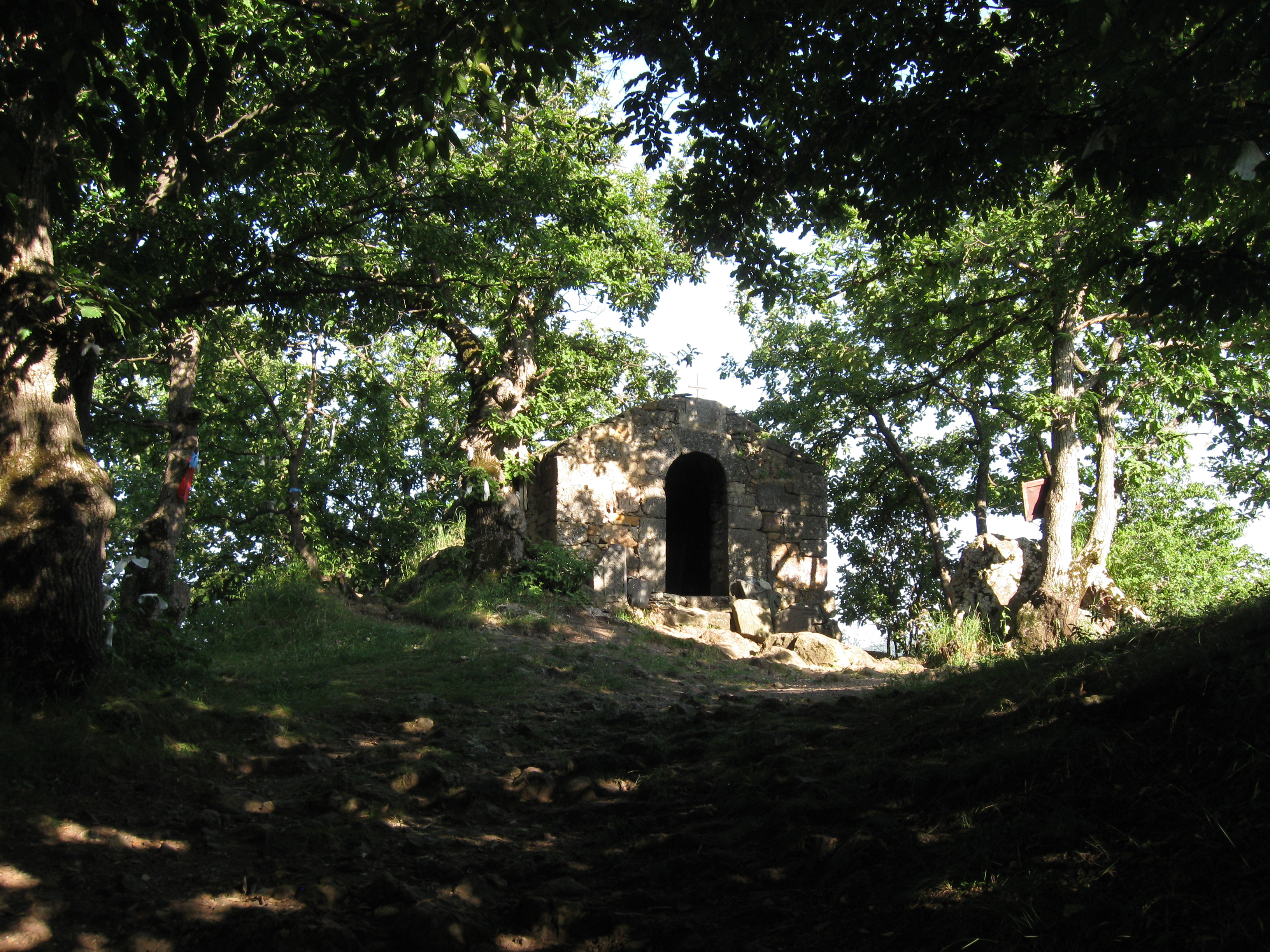 Մատուռ Սբ. Նշան 7/27